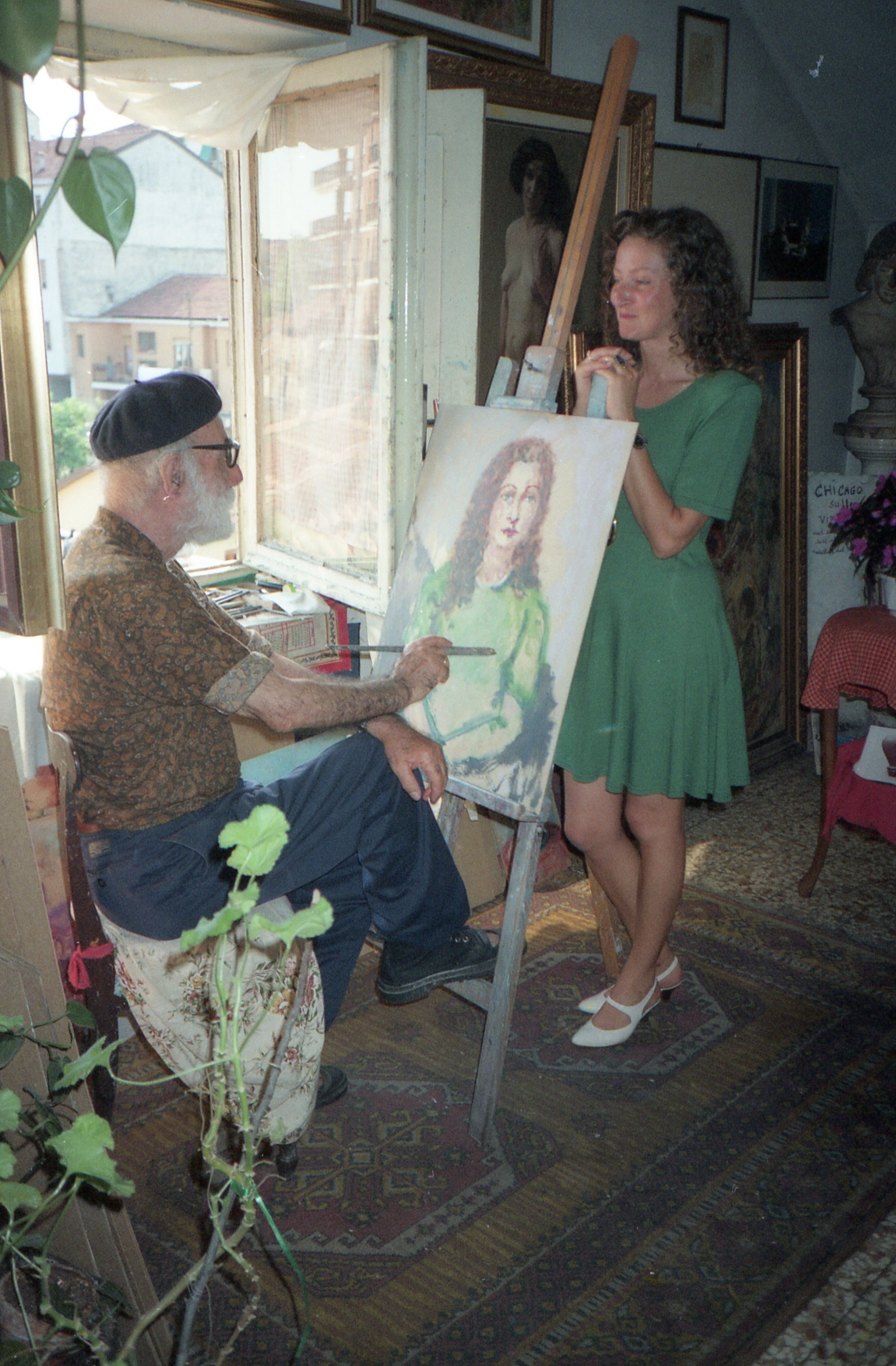 Pietro Augusto Cassina all'opera nella sua mansarda di via Cogne 33.